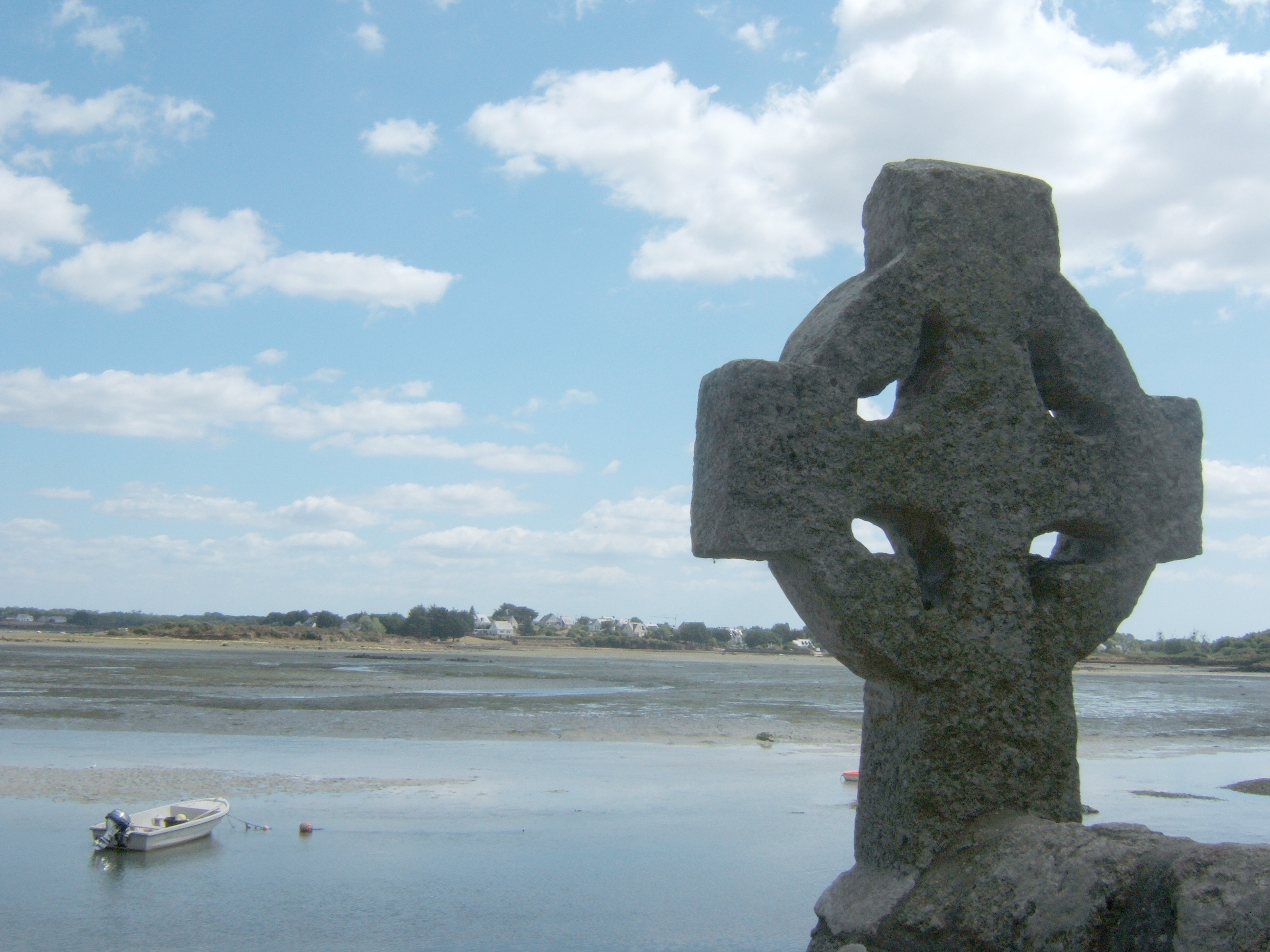 Croix celtique en granite à Saint-Cado dans la Ria d'Étel (Morbihan).